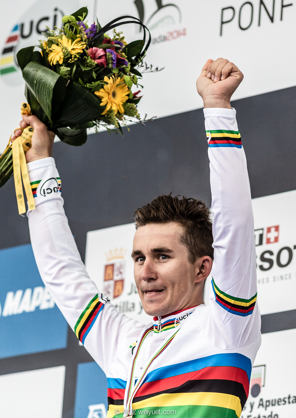 RR Men's Elite